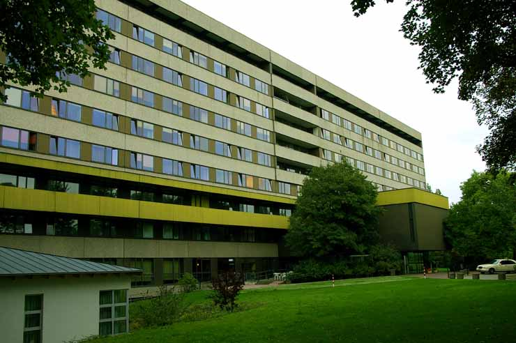 Evangelisches Krankenhaus Witten mit Krankenhauskirche oberhalb des Eingangsbereiches.